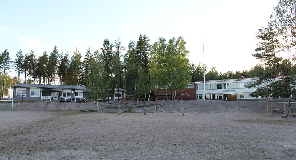 Kivistön koulu Kivistön kaupunginosassa, Vantaan Kivistön suuralueella, Kehäradalle rakennettavan Kivistön aseman vieressä. Huom: Muista säilyttää viittaus kuvaajaan, mikäli käytät kuvaa.